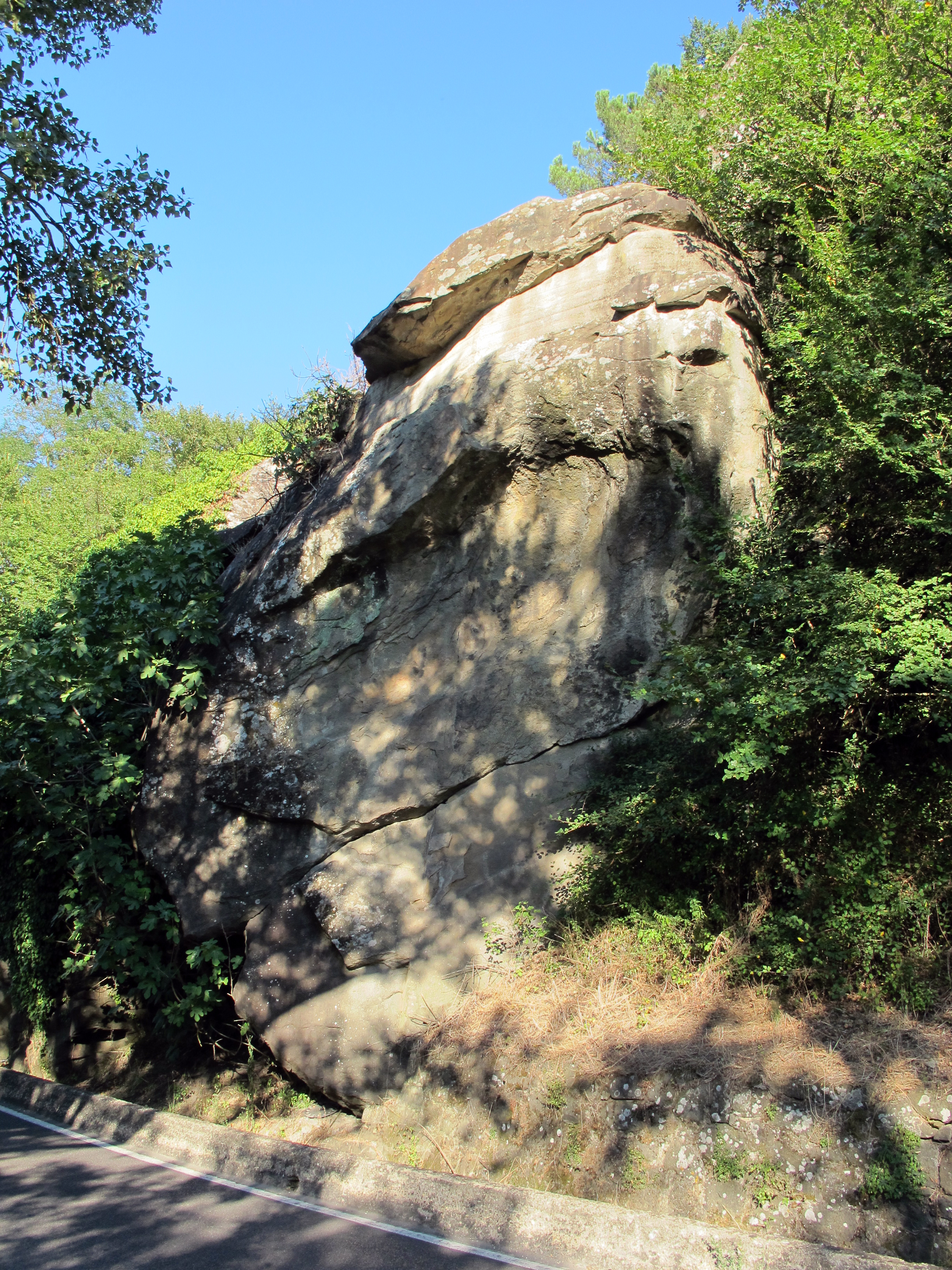 Gonfolina